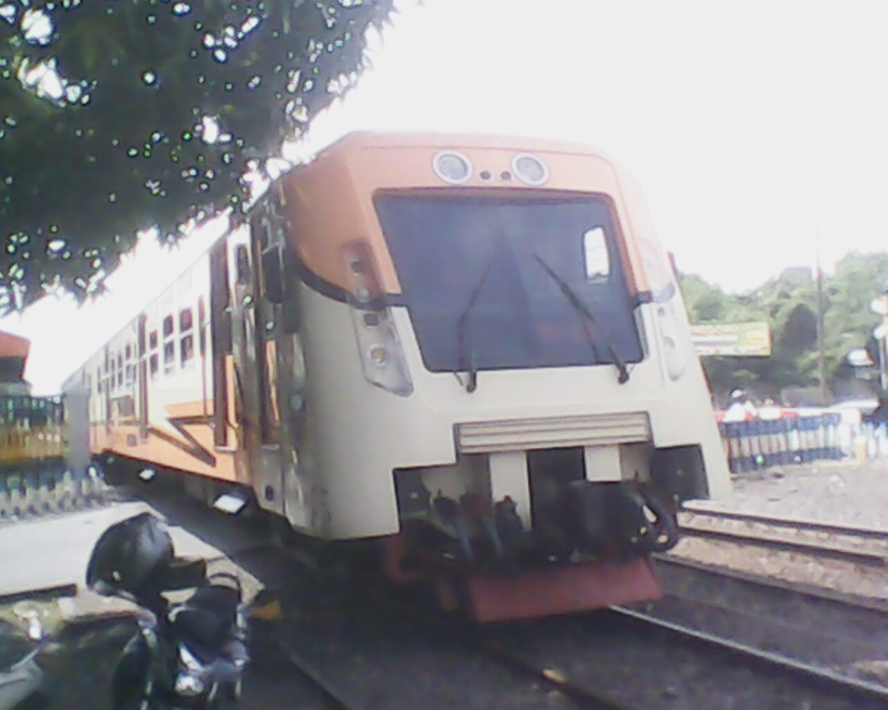 Lepas Stasiun Gubeng menuju Madiun